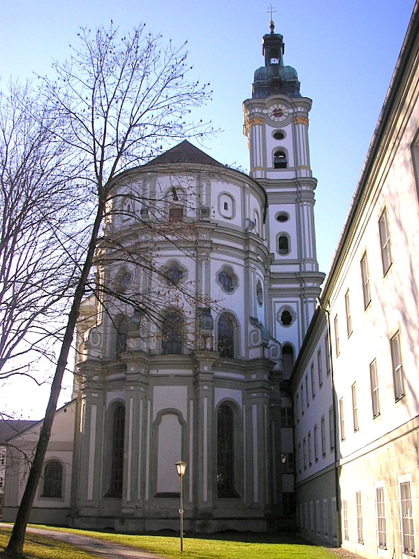 Klosterkirche Fürstenfeldbruck (Oberbayern). Ansicht von Osten. Eigene Aufnahme, Jan 2007 / Fürstenfeldbruck monastery (Upper Bavaria, Germany). The church from the east. Own photo, Jan 2007